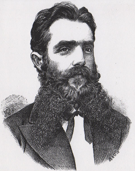 Светозар Ивачковић, архитекта (1844-1924)